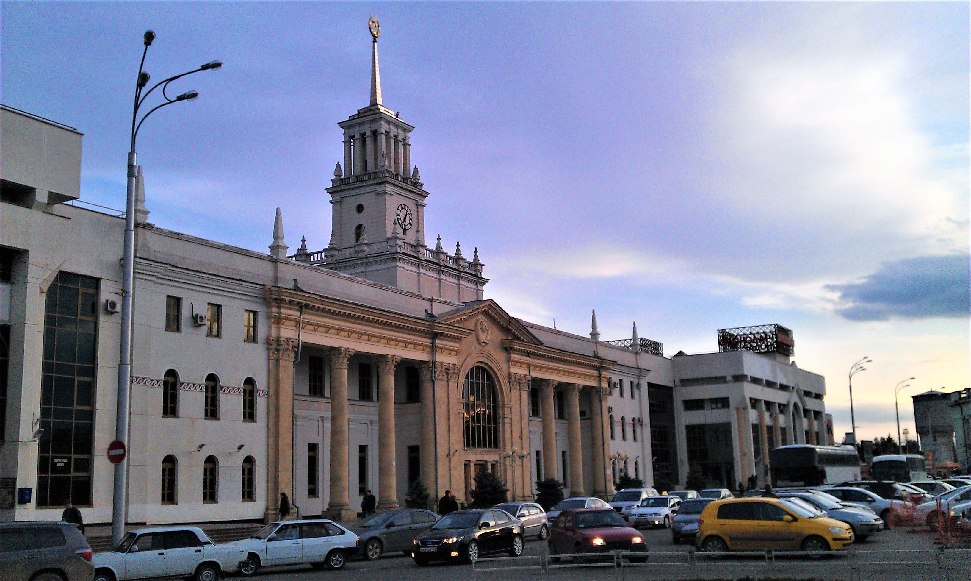 Вид со стороны автовокзала